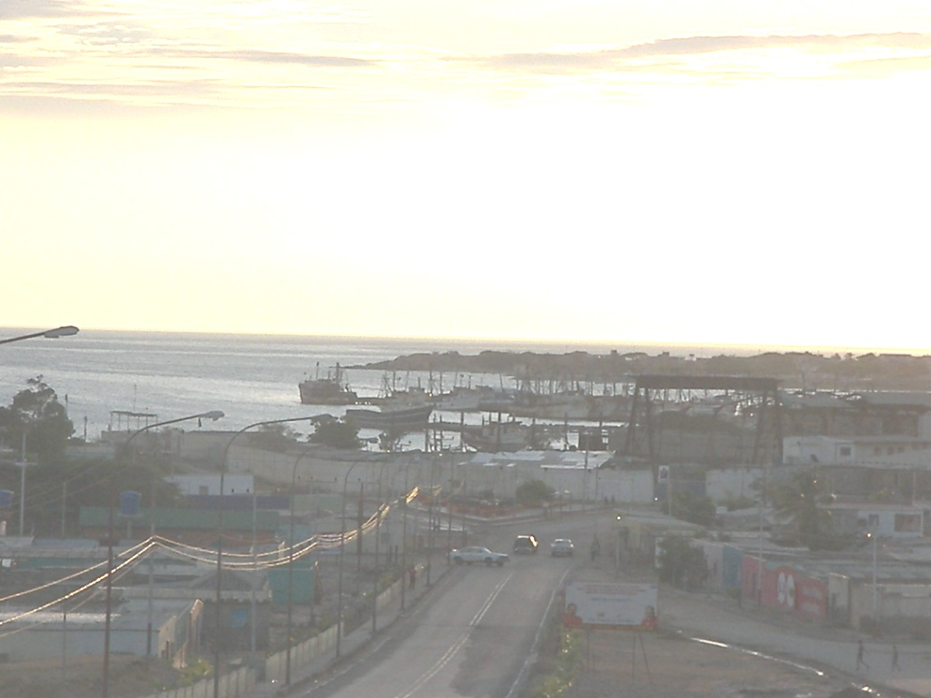 Las Piedras.